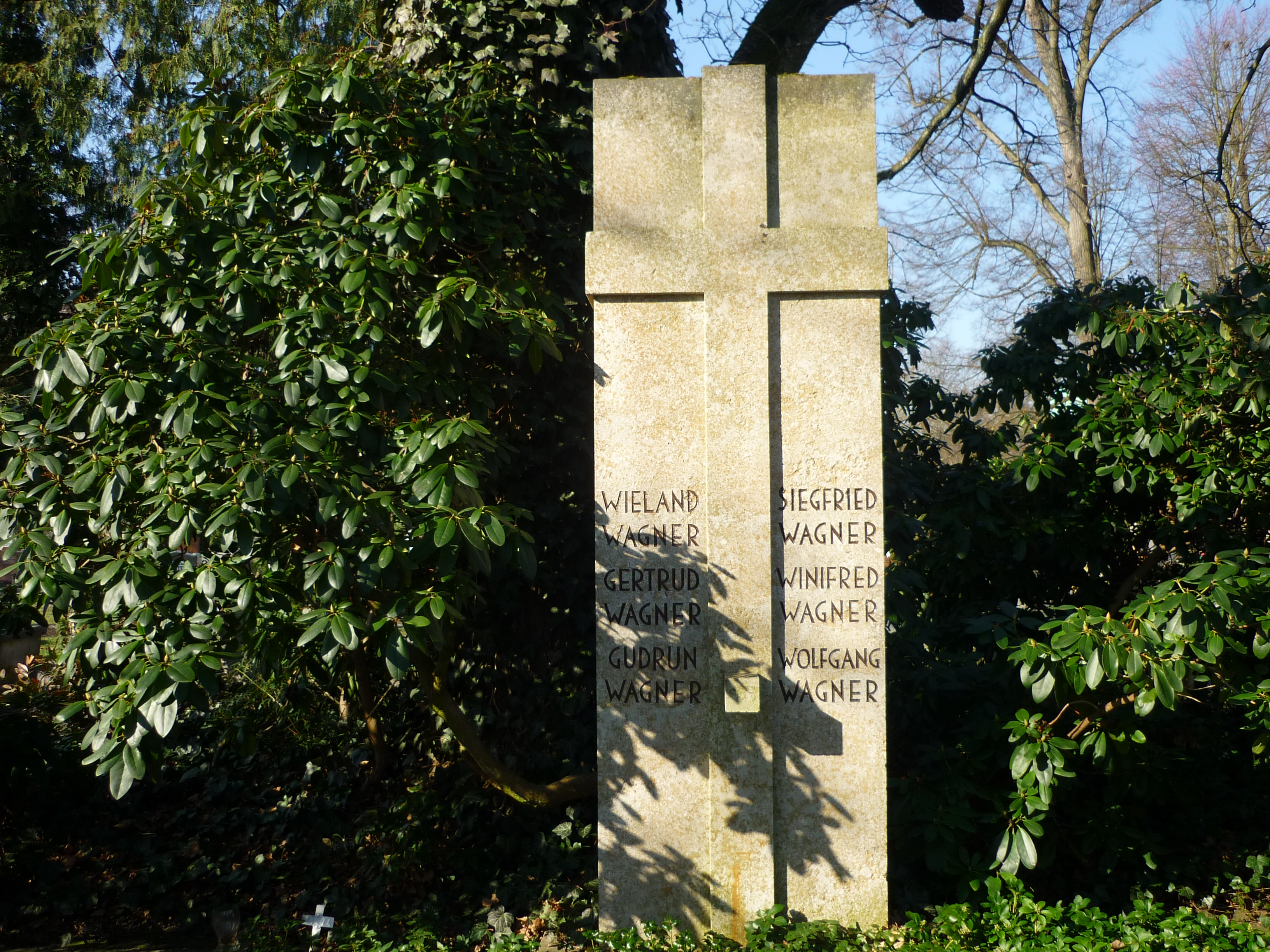 Stadtfriedhof (Bayreuth), Grabstätte von Siegfried Wagner und Ehefrau Winifred Wagner, Wieland Wagner und Ehefrau Gertrud Wagner, sowie Wolfgang Wagner und Ehefrau Gudrun Wagner.